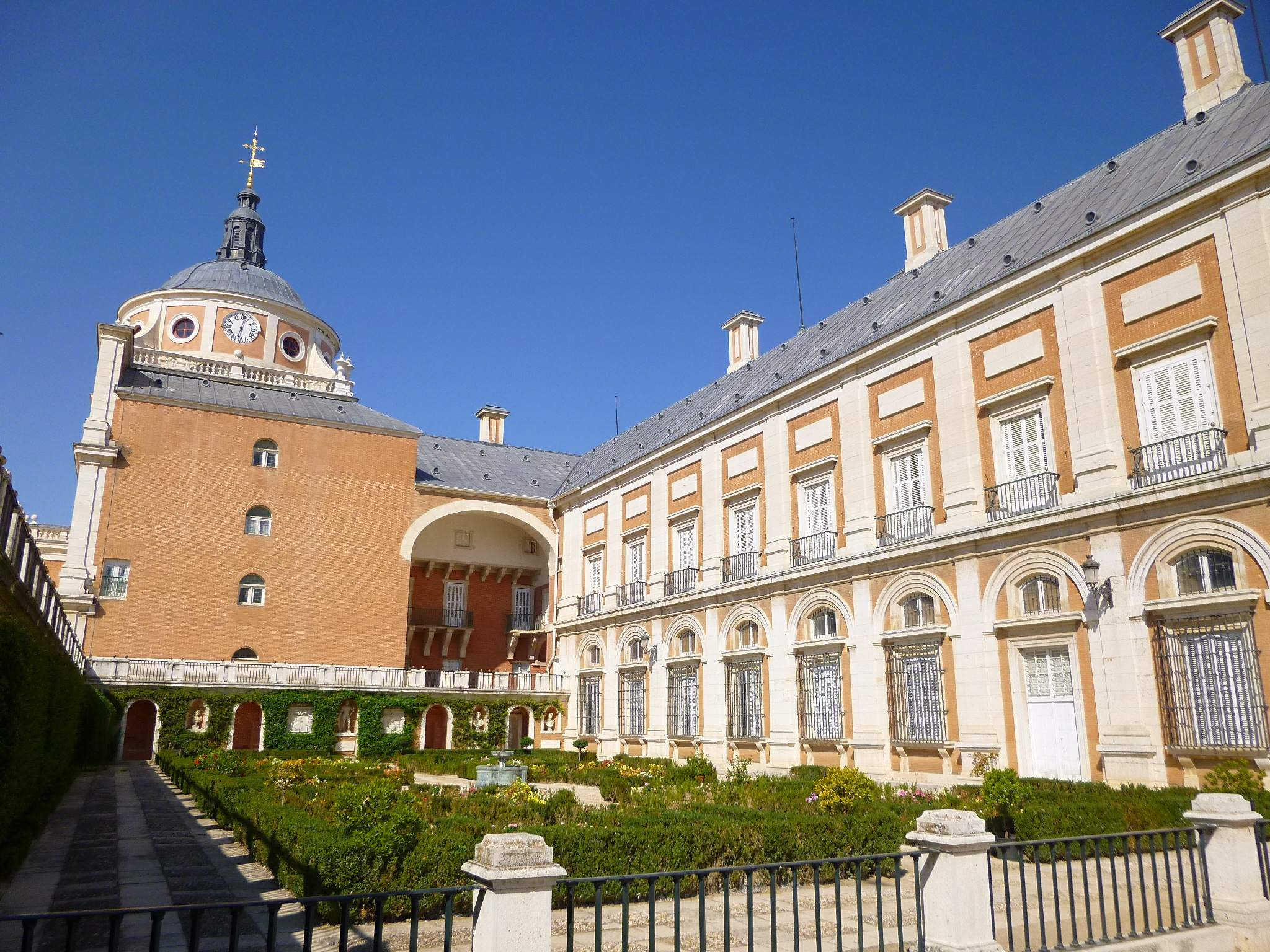 Palacio Real y Jardin del Rey, Real Sitio de Aranjuez